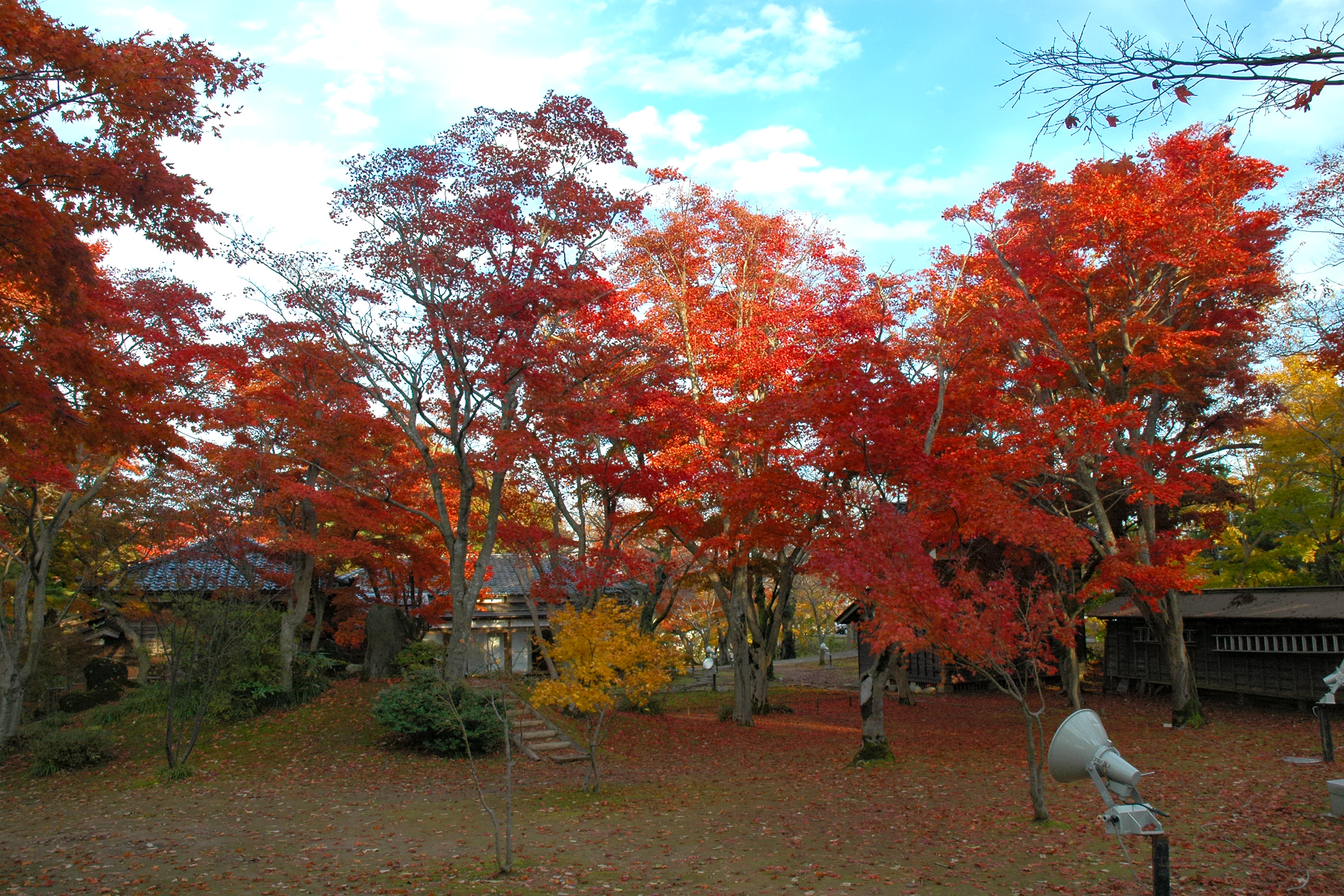 Momijien, Nagaoka, Niigata (長岡市（旧ja:越路町）のもみじ園)